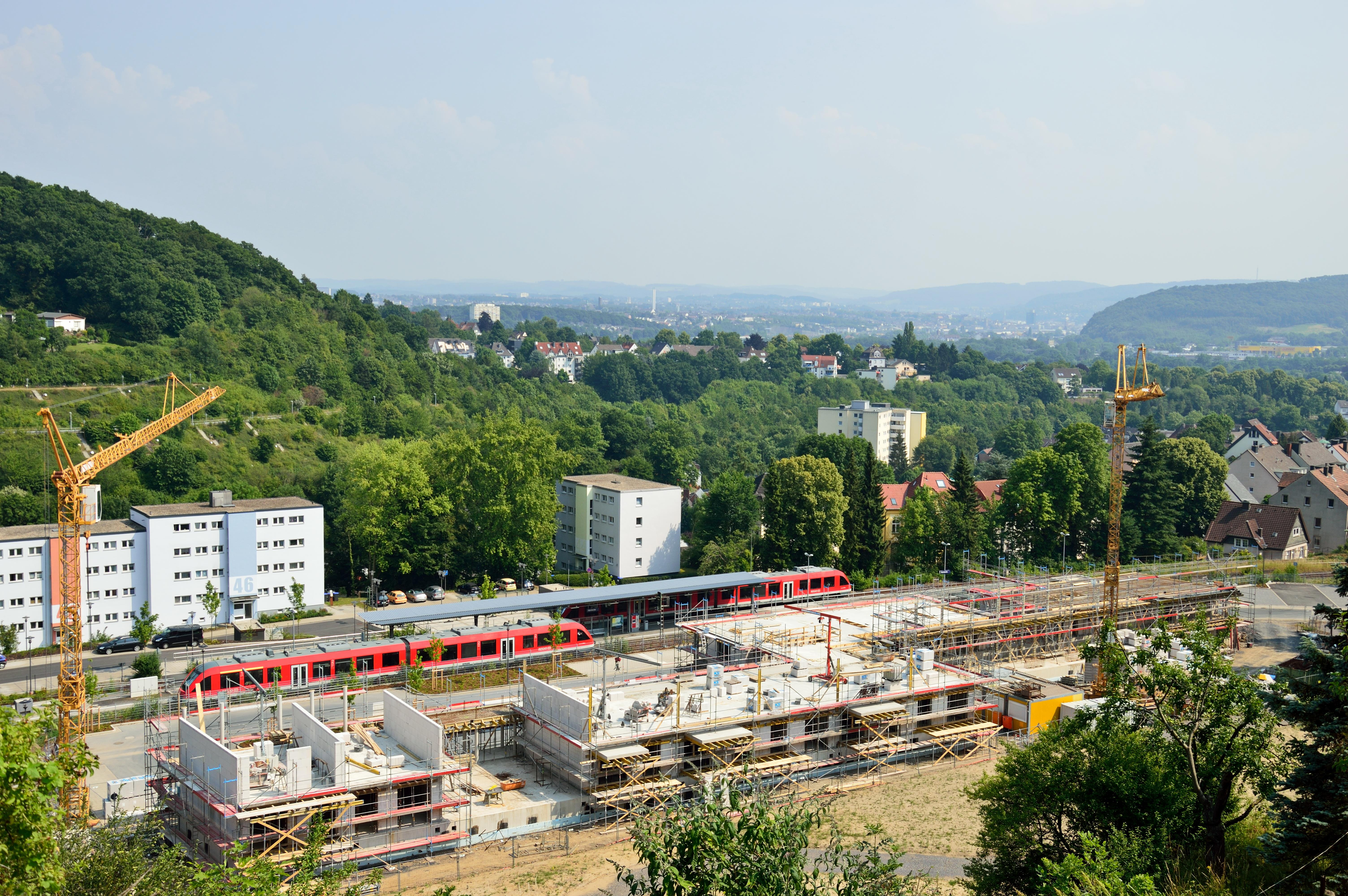 Bahnhof Herdecke, im Hintergrund am Hang die Ortsumgehung der B54